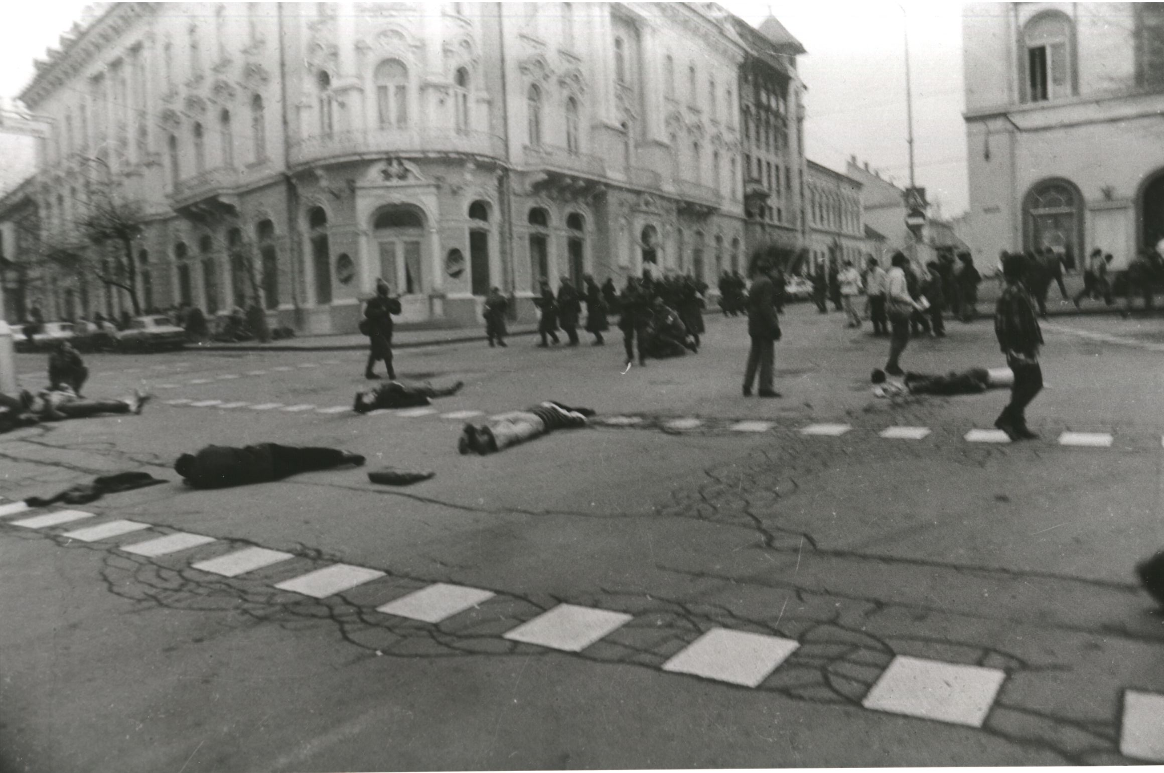 Această poză a fost realizată de către Răzvan Rotta în zilele revoluţiei din 1989. Cătălin Bogdan a cerut acestuia să transmită în domeniu public cele 21 de poze iar dânsul şi-a dat acordul; ulterior acest acord de publicare a fost trimis confirmat către d-nul Rotta, pe data de 5 aprilie 2010, la adresa - vezi tichetul 2010032110014341)